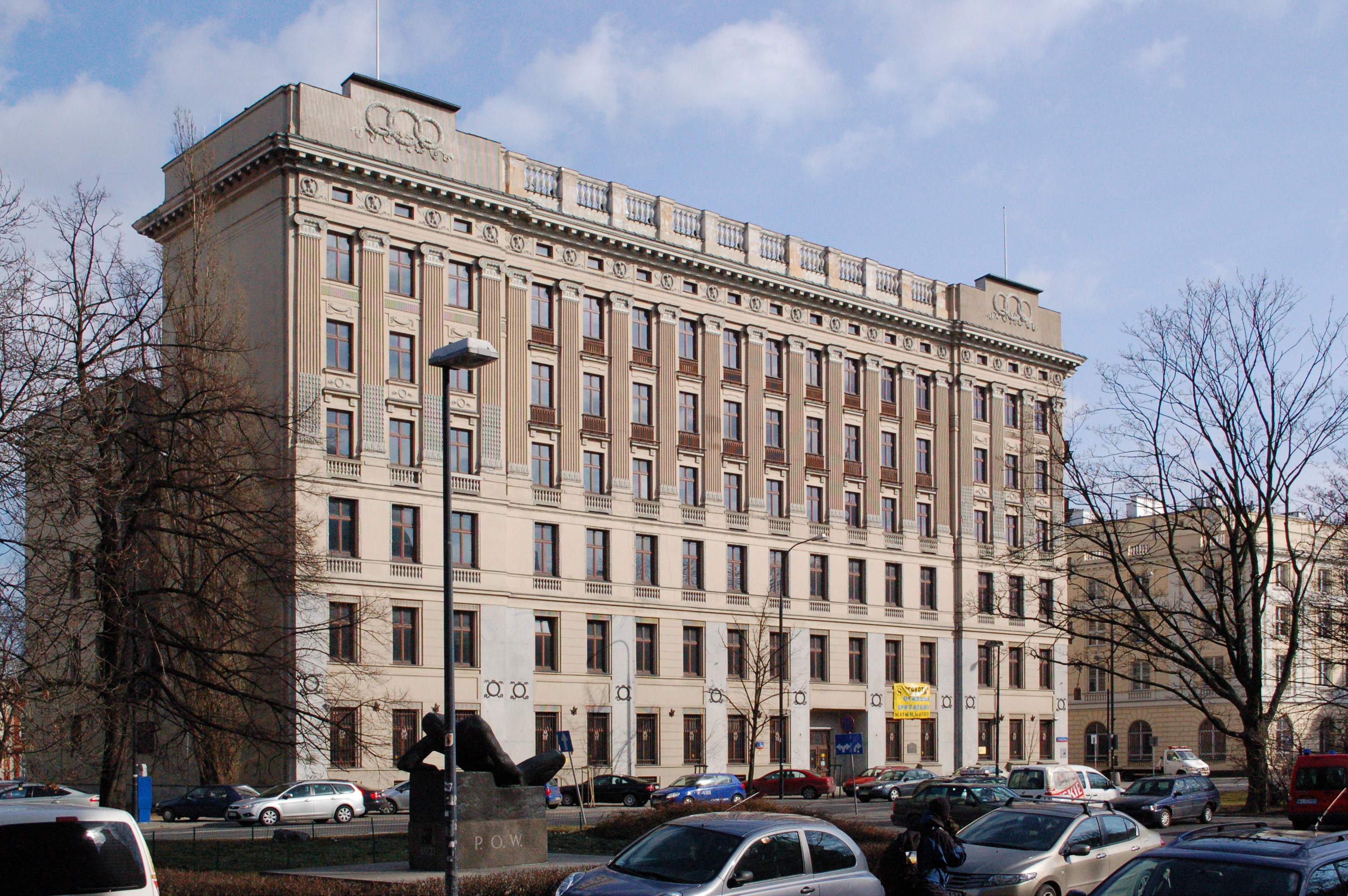 Krasiński-Gebäude am Małachowski-Platz